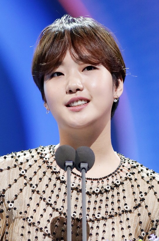 160603 백상 김고은